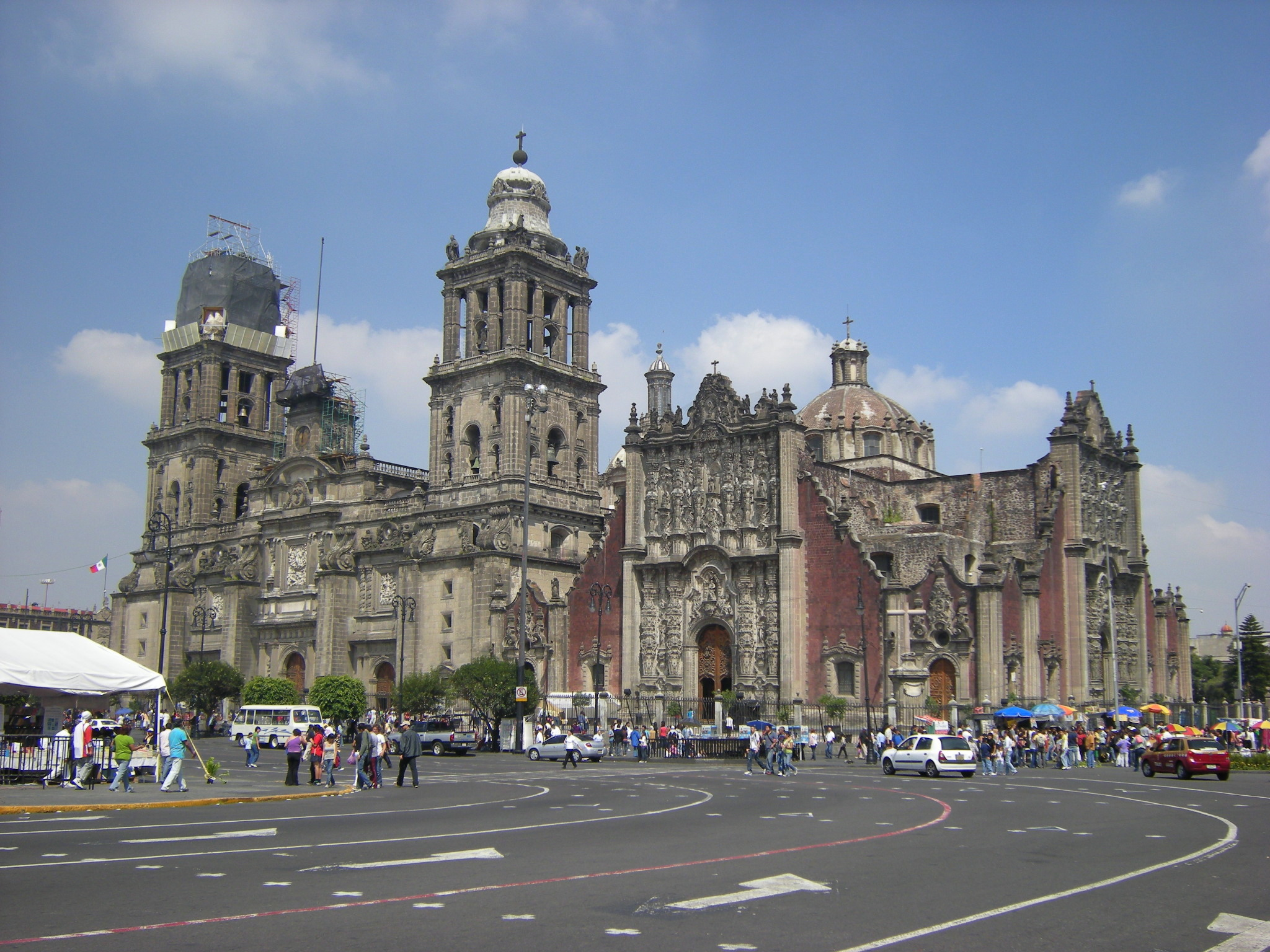 Cidade do México